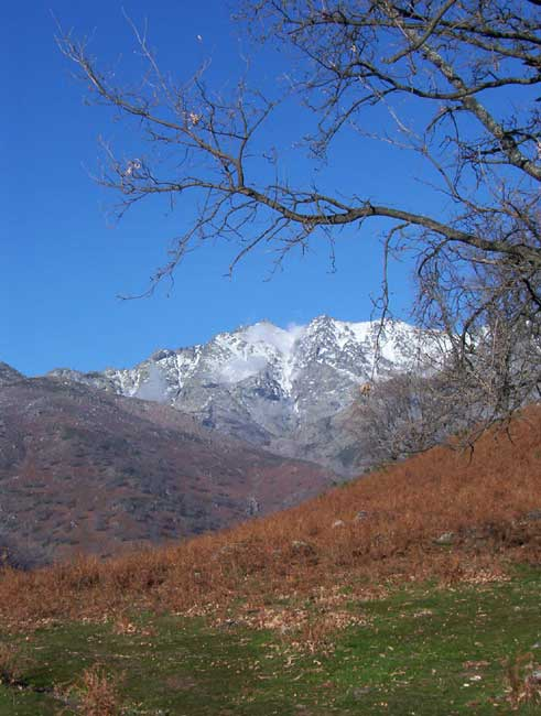 Vista de la Sierra de Gredos desde Candeleda, en Ávila (España)